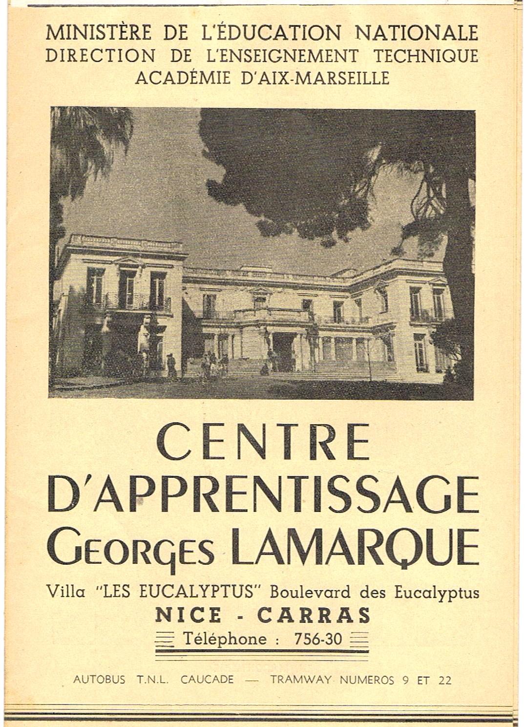 Recto de la plaquette de présentation du centre d'apprentissage Georges Lamarque réalisée par son fondateur-directeur Marcel Payan en 1950 à Nice (Alpes Maritimes) France.